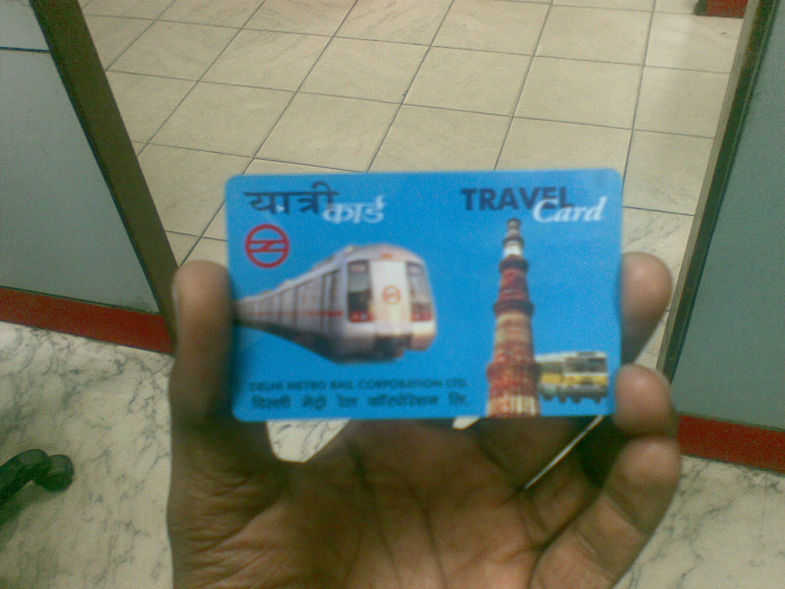 ഡെൽഹി മെട്രോ ടെയിനിൽ യാത്രയ്ക്ക് ഉപയോഗിക്കുന്ന സ്മാർട് കാർഡ്.